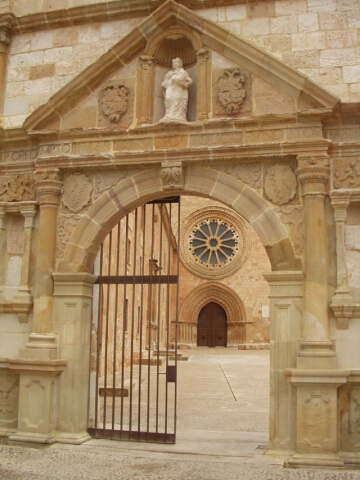 Entrada al Monasterio de Santa María de Huerta (Soria)